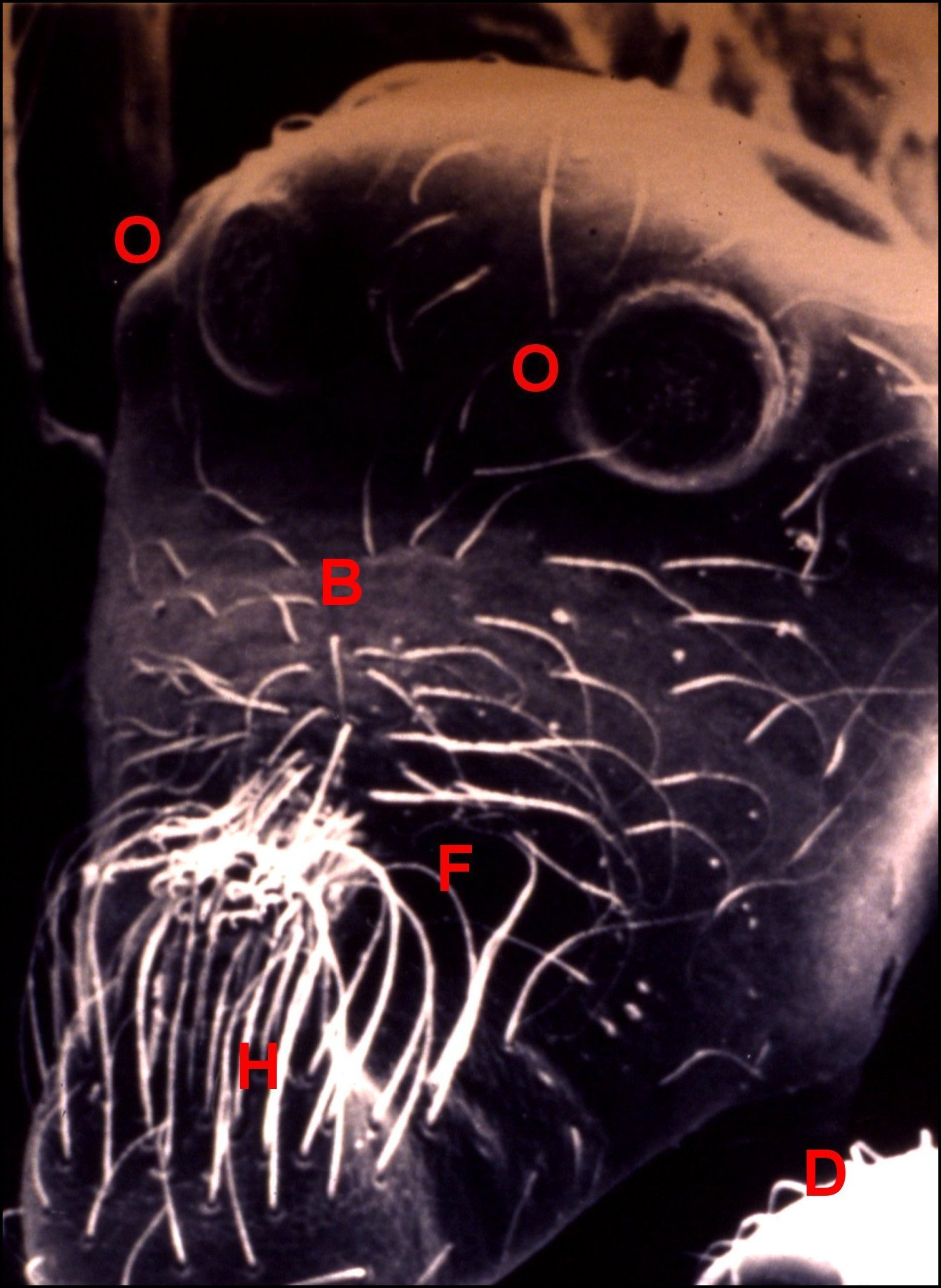 Vue antérieure du prosoma d' Argyrodes benedicti mâle en microscopie électronique à balayage